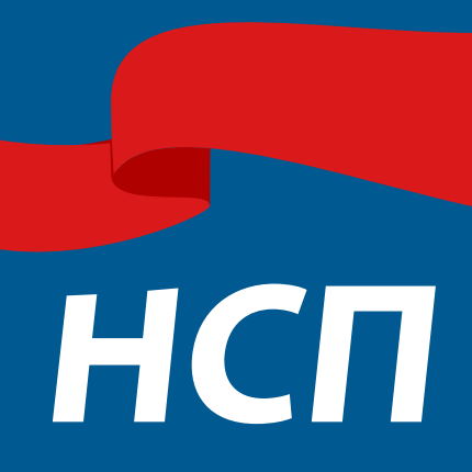 Лого Народног слободарског покрета